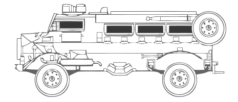 Casspir mk 1